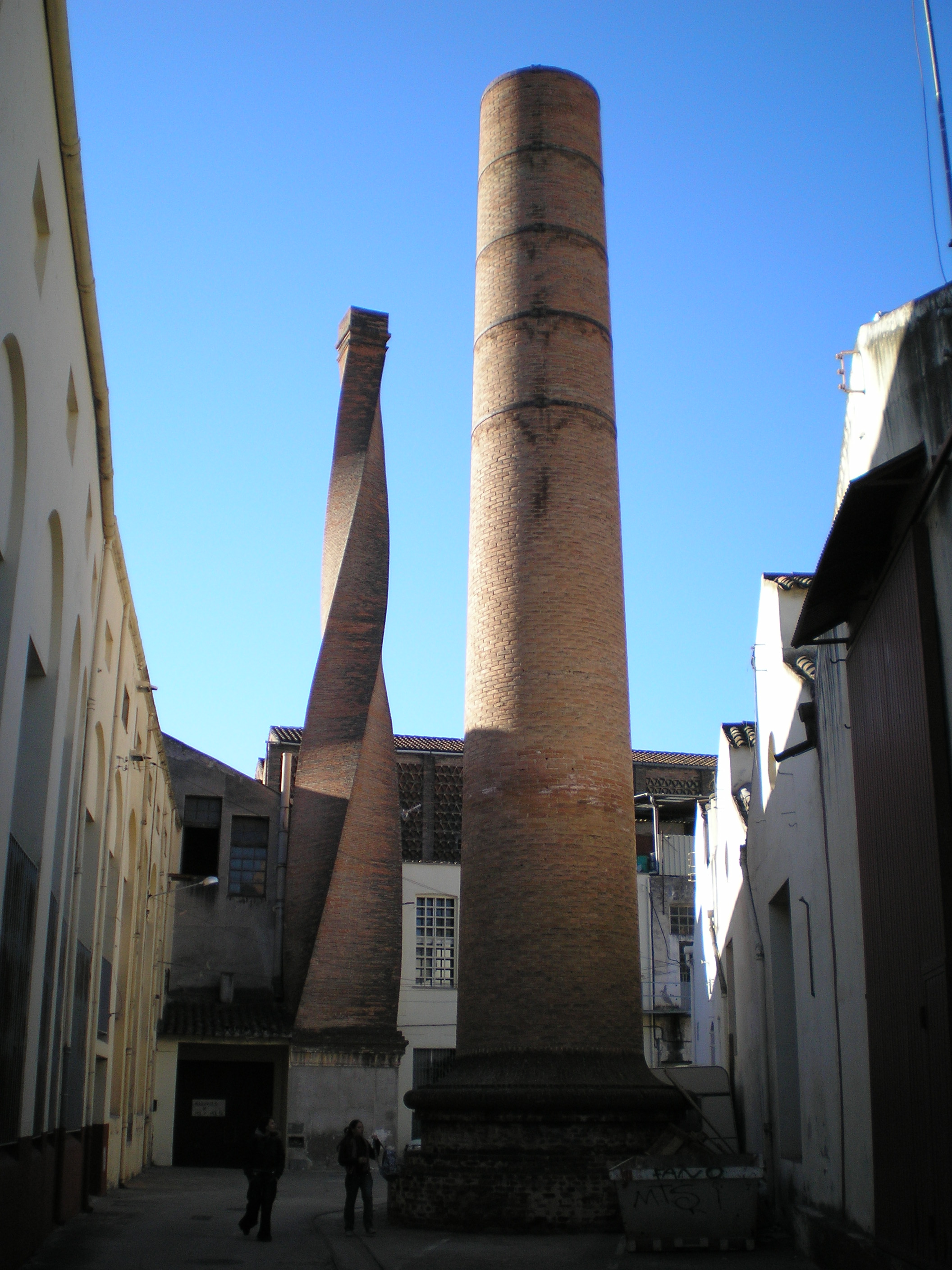 Xemeneies de la fàbrica de la Colònia Sedó (Esparreguera)